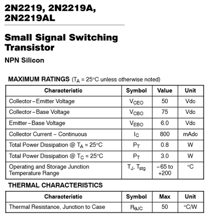 descripcion transistor elegido para el problema 1